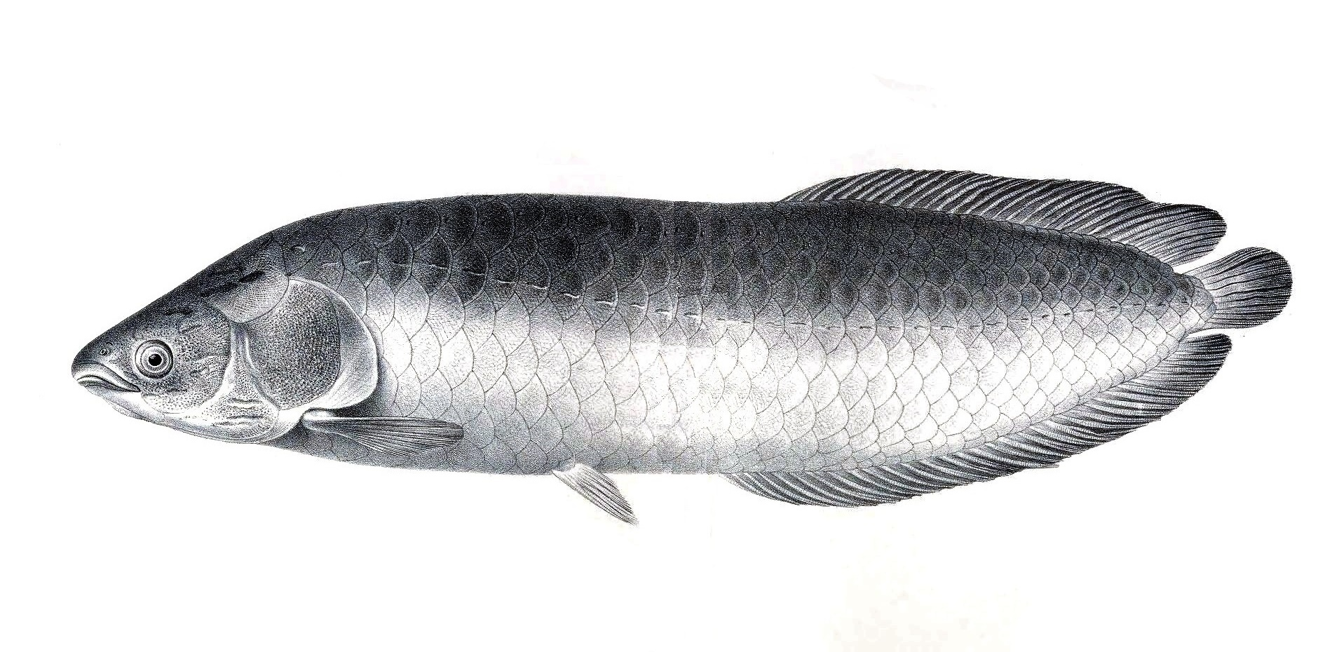 Нильский гетеротис (Heterotis niloticus)